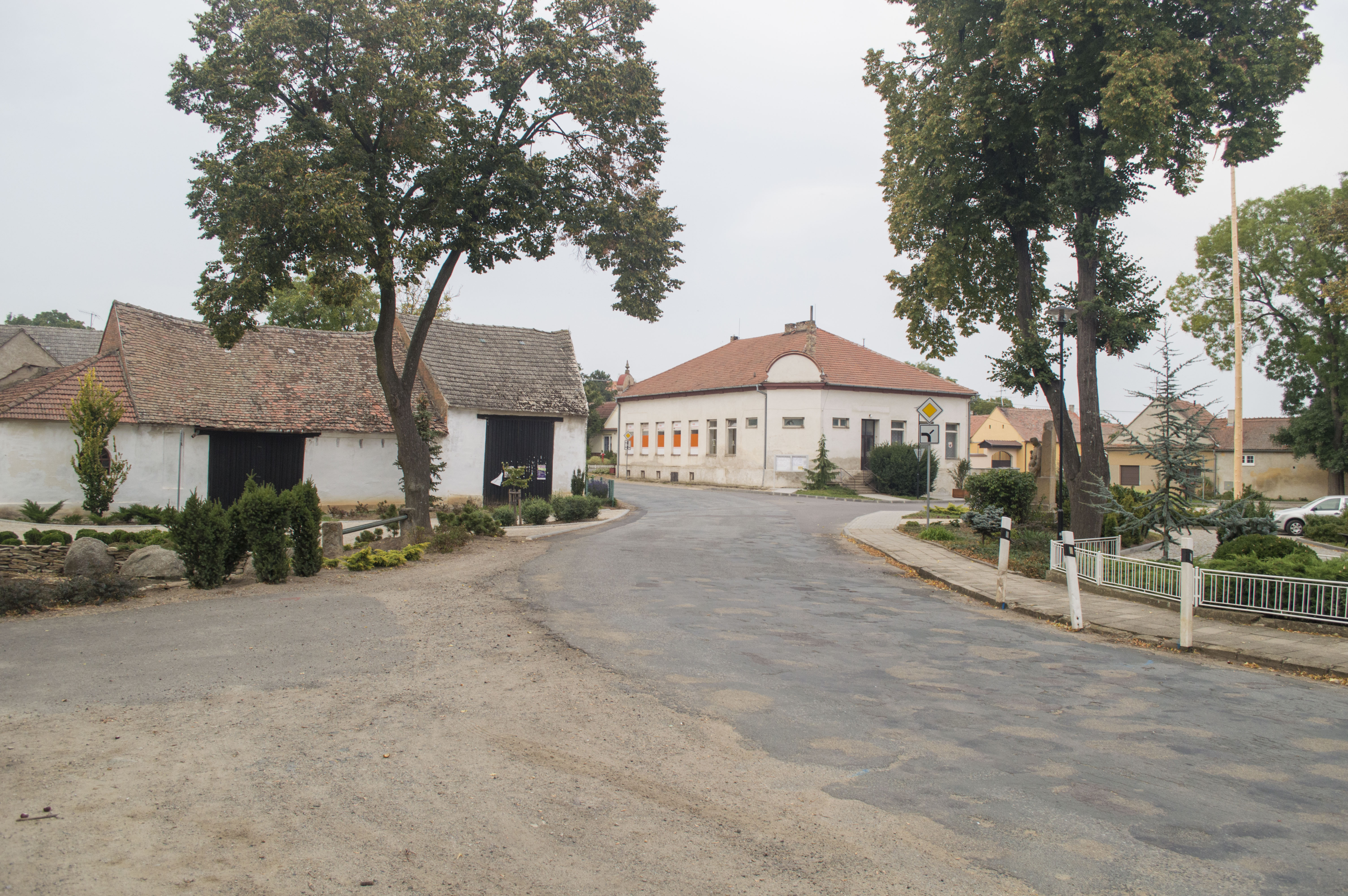 Náves v Miroslavských Knínicích.